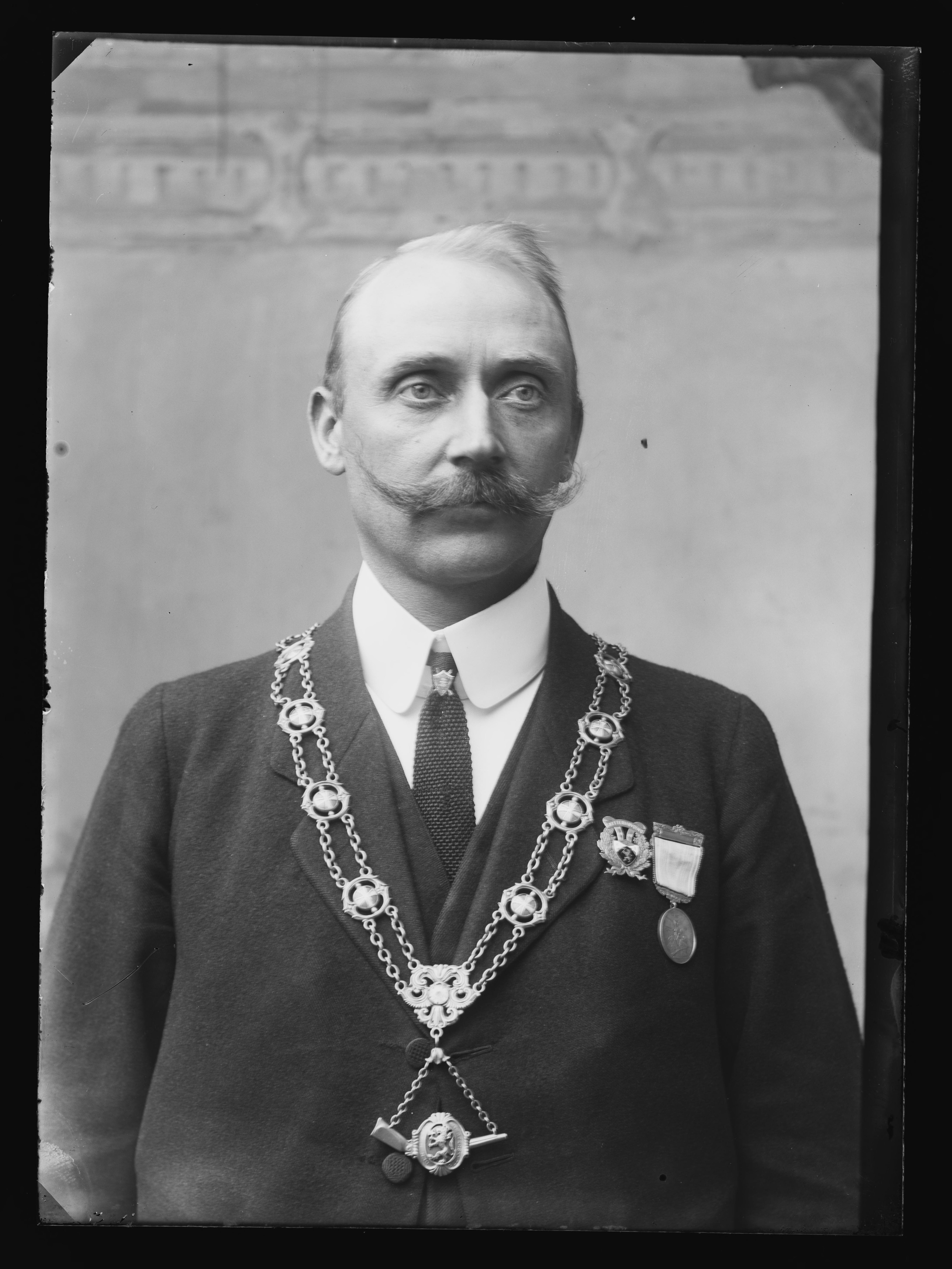 Bildet er hentet fra Nasjonalbibliotekets bildesamling. Anmerkninger til bildet var: Påskrift arkivark: Hr G. G. Skattebo Arkivnummer: 178